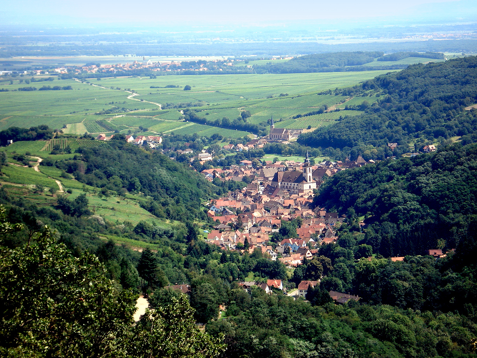 Le village d'Andlau (Bas-Rhin, Alsace, France), vu depuis le château du Spesbourg. On distingue l'église Saint-Pierre-et-Paul au milieu du village, et la chapelle Saint-André au-delà, un peu à l'écart. À l'arrière-plan : plaine d'Alsace, avec le village d'Epfig. Coup d'œil vers le sud-est.